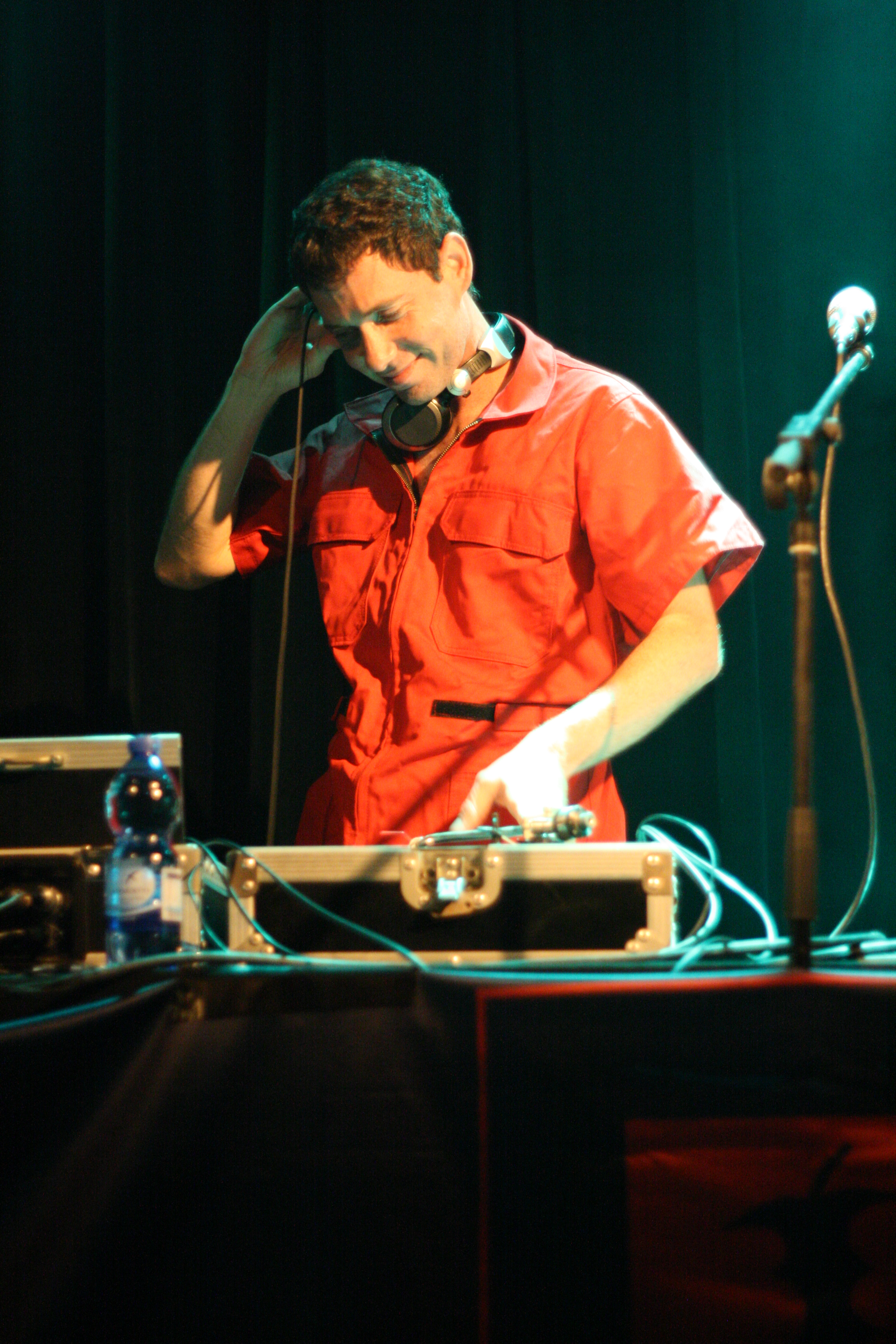 ארז טודרס בהופעת התפוחים. צילום: דפנה טלמון